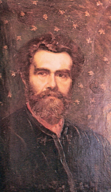 Autoportrait